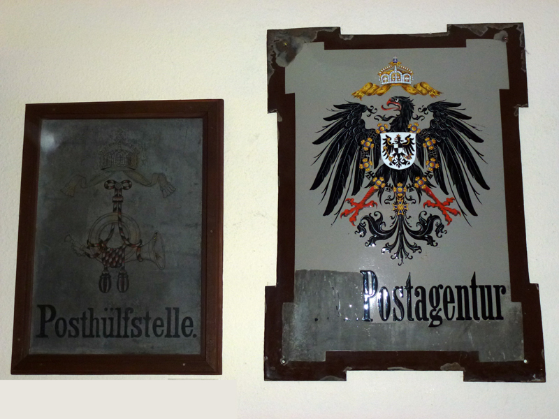 Posthausschilder: Posthilfstelle und (Kais.) Postagentur